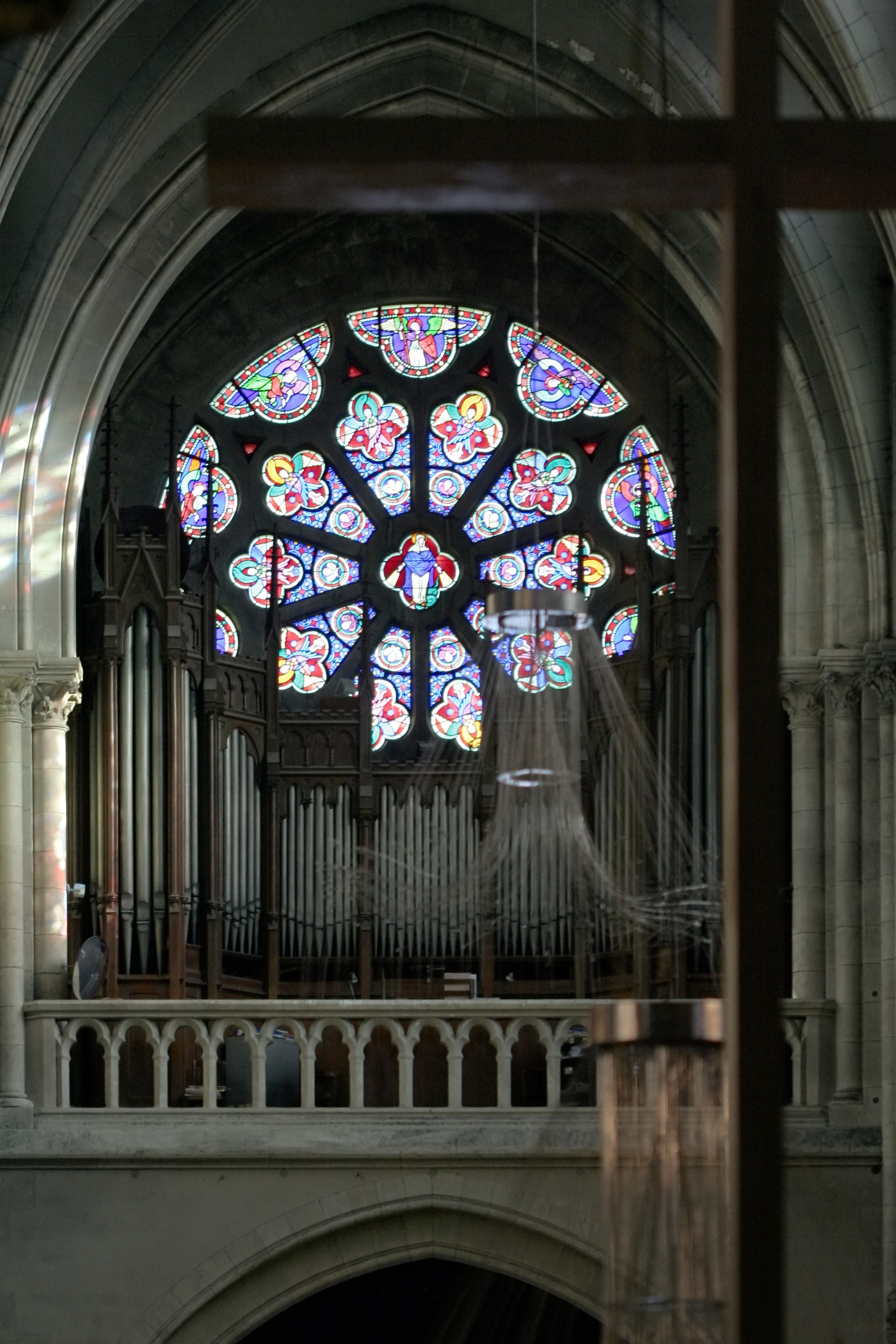 Église Saint-Jean-Baptiste de Belleville, Paris 19e arrondissement. Orgue et rosace.